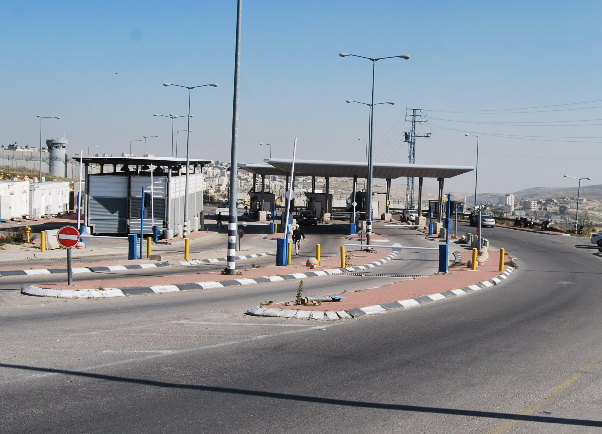 מחסום חיזמה